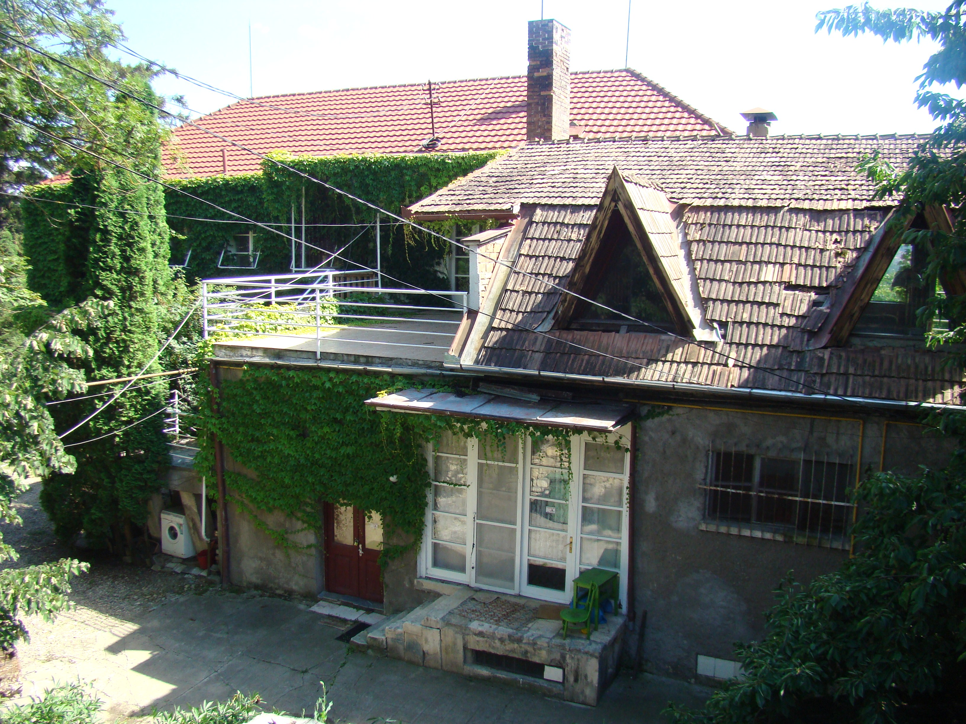 Clădire monument istoric, str. C.A.Rosetti, nr.17 (Casa Tătaru)